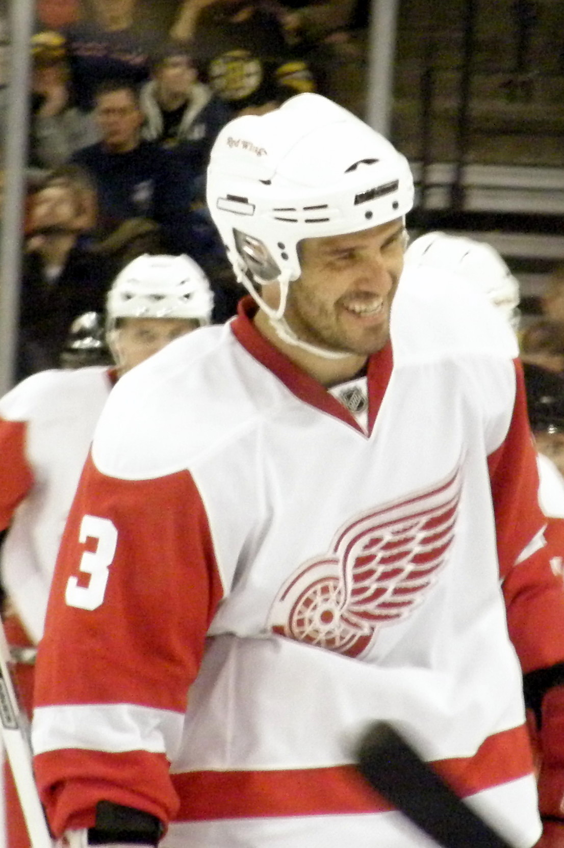 #3 Andreas Lilja (D)